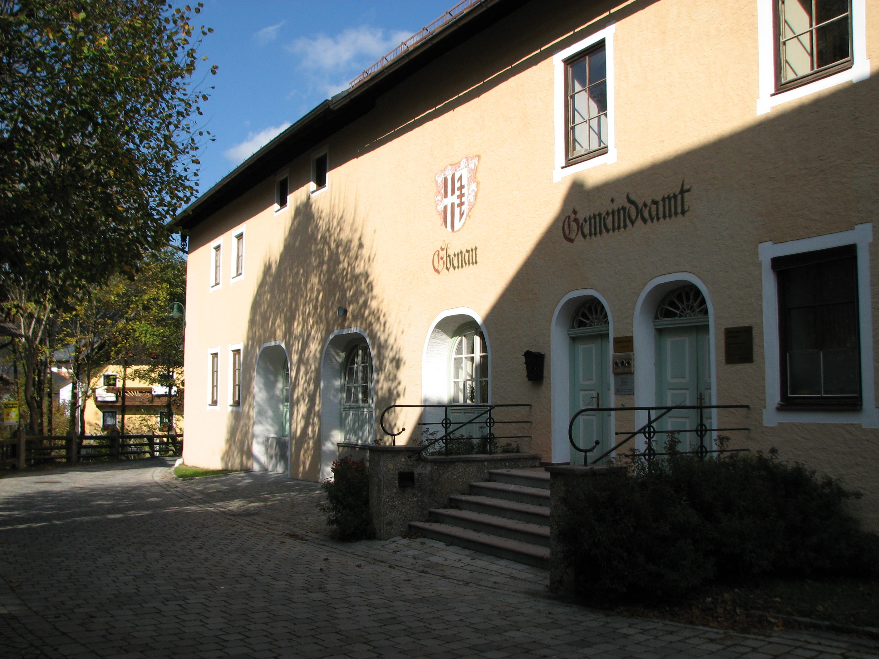 Gemeindehaus, Fürstenstöckl, Heimatmuseum, ehem. Schmelzhütte